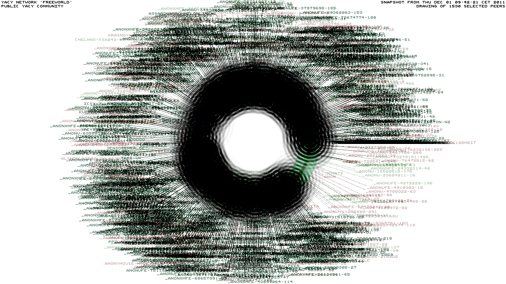 Estado de la red YaCy el día 01-12-2011